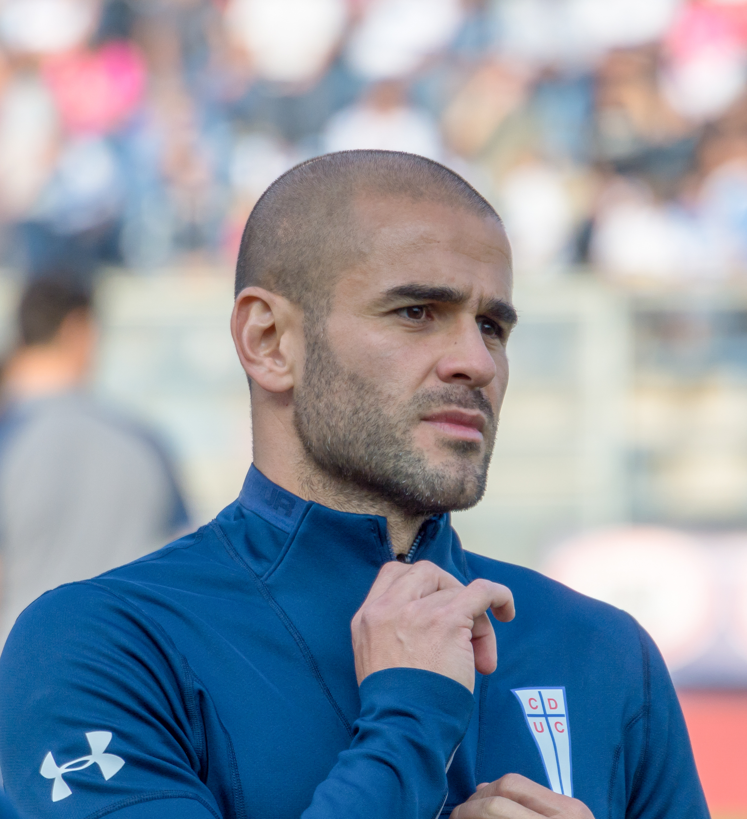 Sebastián Sáez, Universidad Católica v Curicó Unido, Estadio San Carlos de Apoquindo, Las Condes, Santiago, Región Metropolitana, Chile.